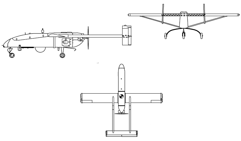 RQ-2B Pioneer (drawing)